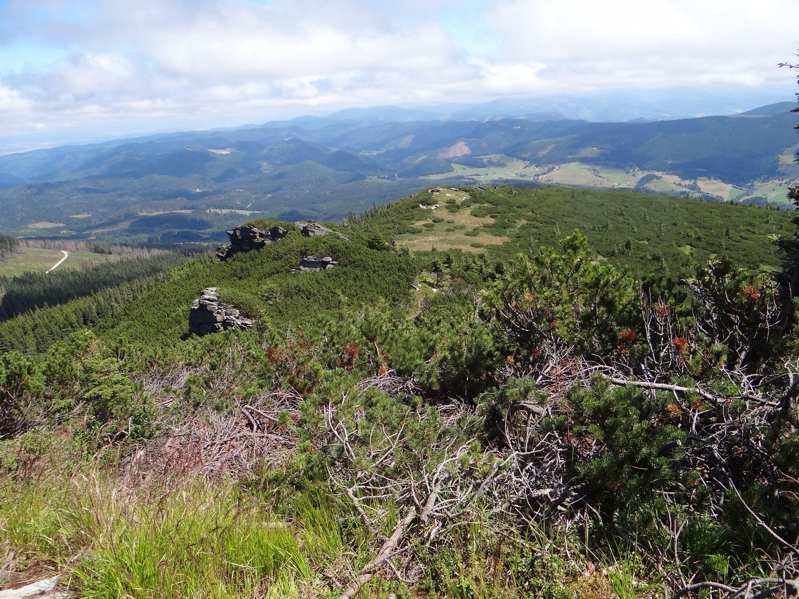 Králová skala